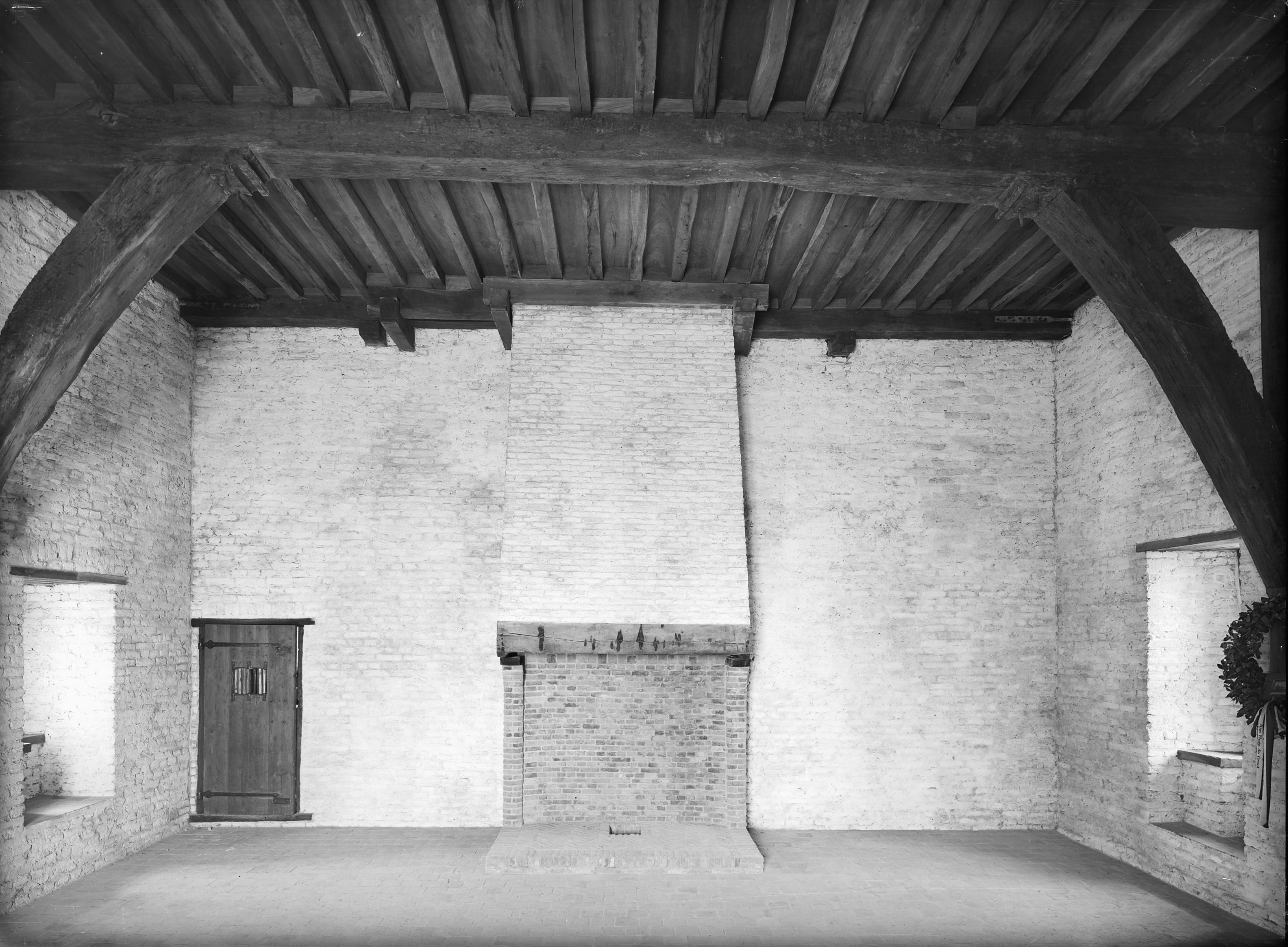 Kasteel Loevestein: 2e verdieping, kamer zogenaamd van Hugo de Groot vanuit het noorden